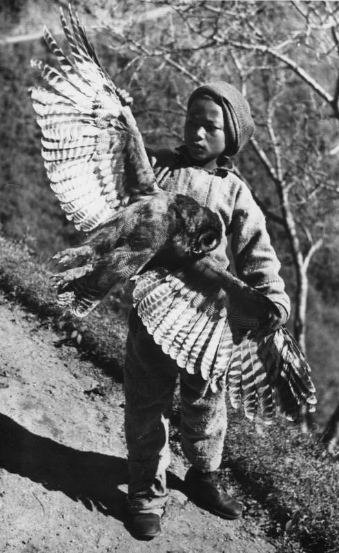 Gangtok, Großeule